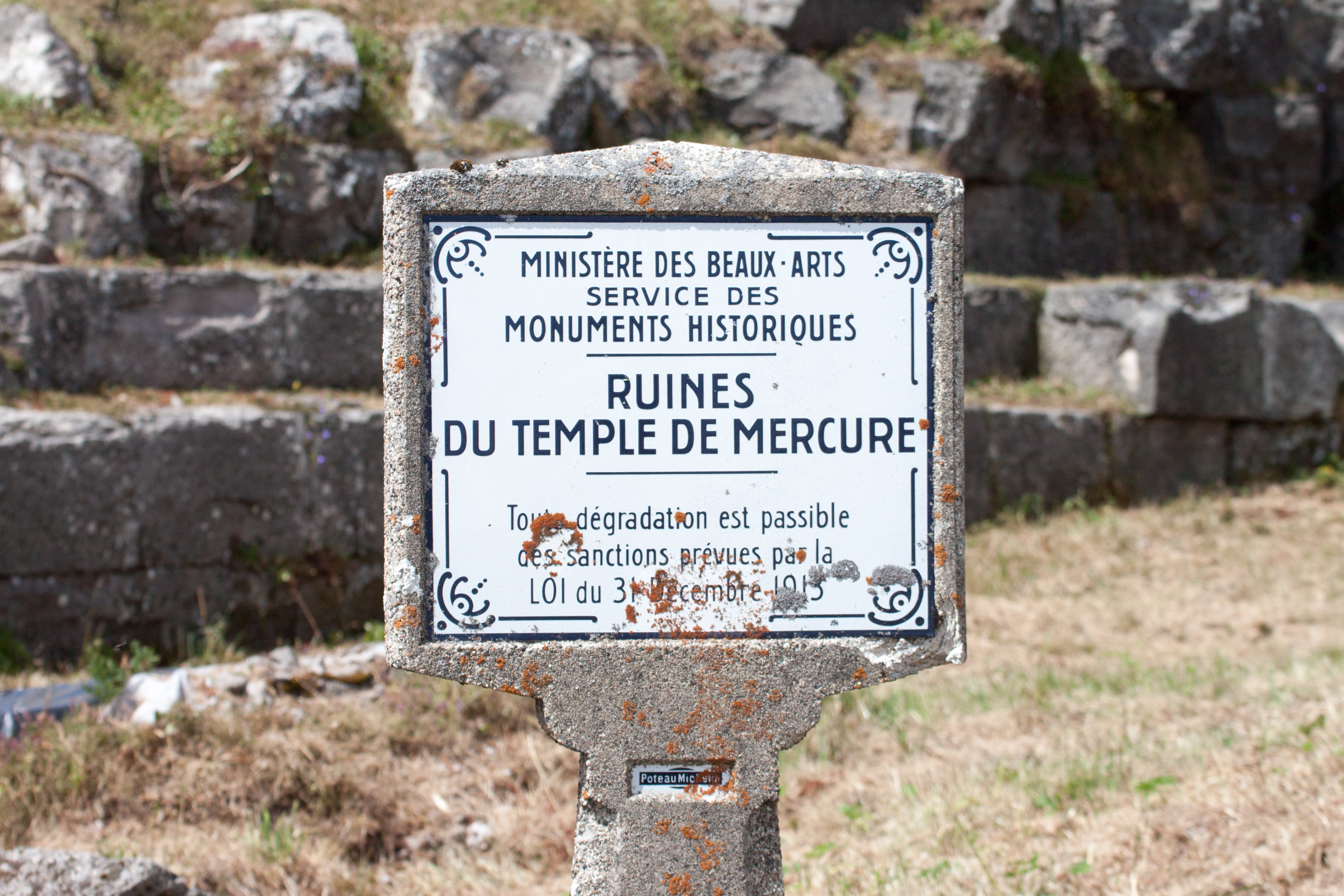 Ministère des Beaux-Arts - Ruines du temple de Mercure